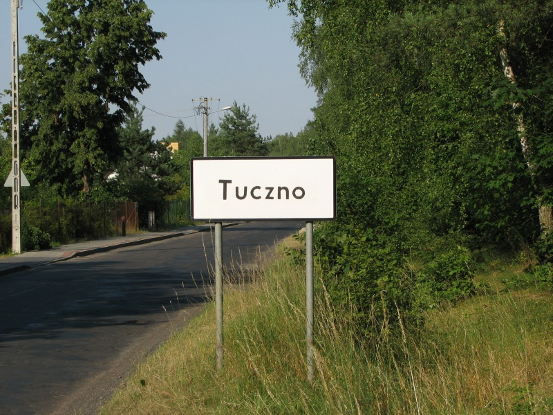 Tablica Tuczno, główna droga biegnąca przez Tuczno Licence is concerning 800x600px photo